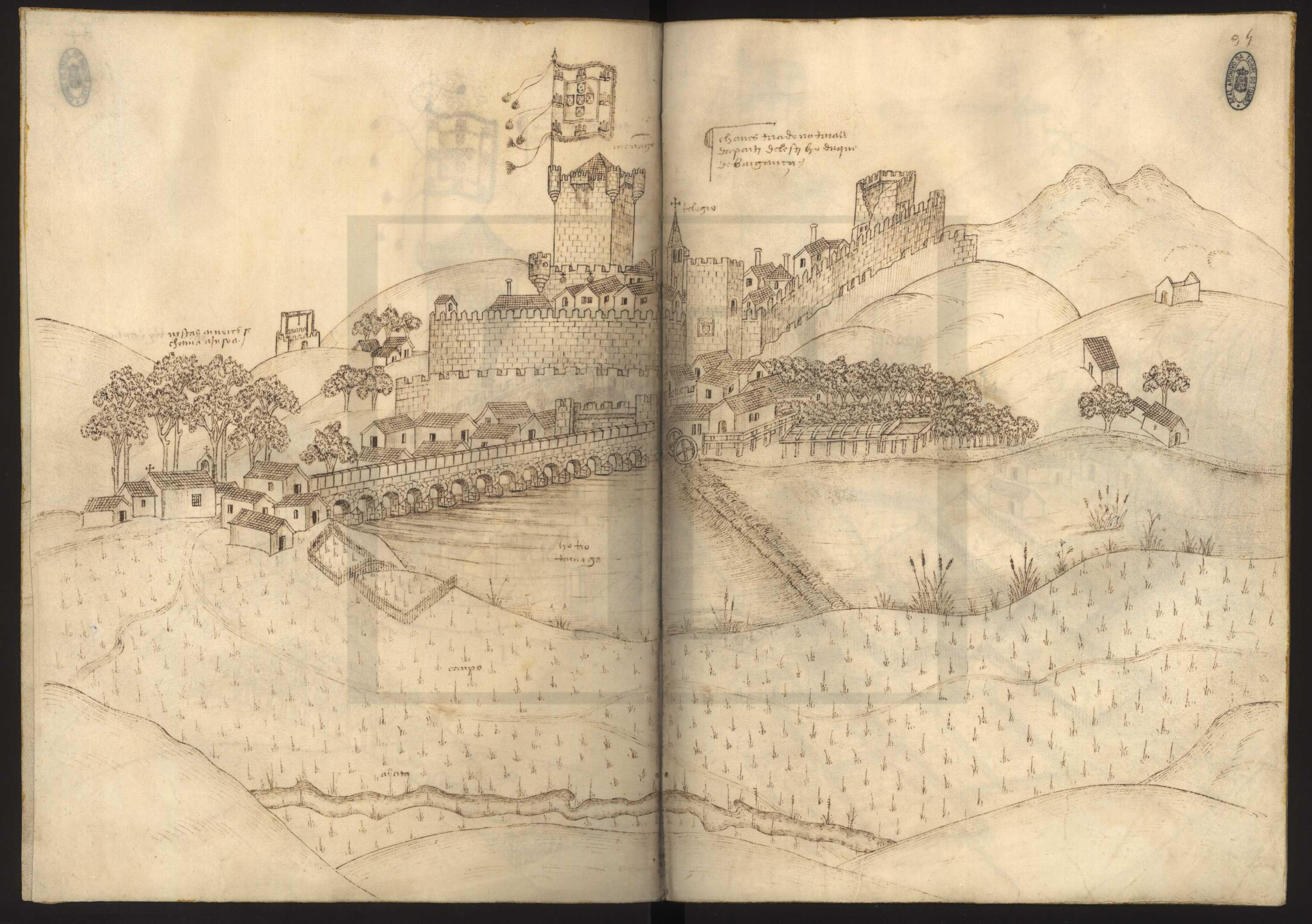 Livro das Fortalezas 95 - Chaves